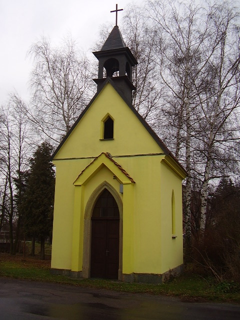 Kaple sv. Anděla Strážného